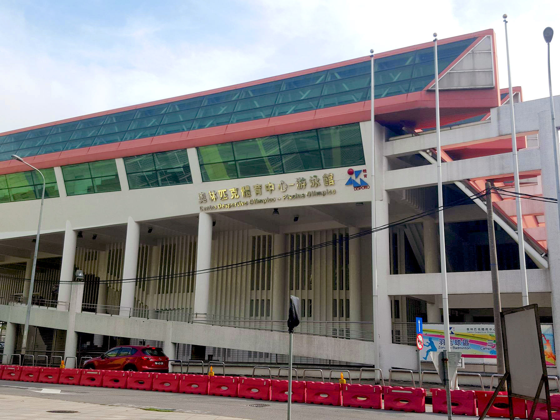 Centro Desportivo Olímpico - Piscina Olímpica